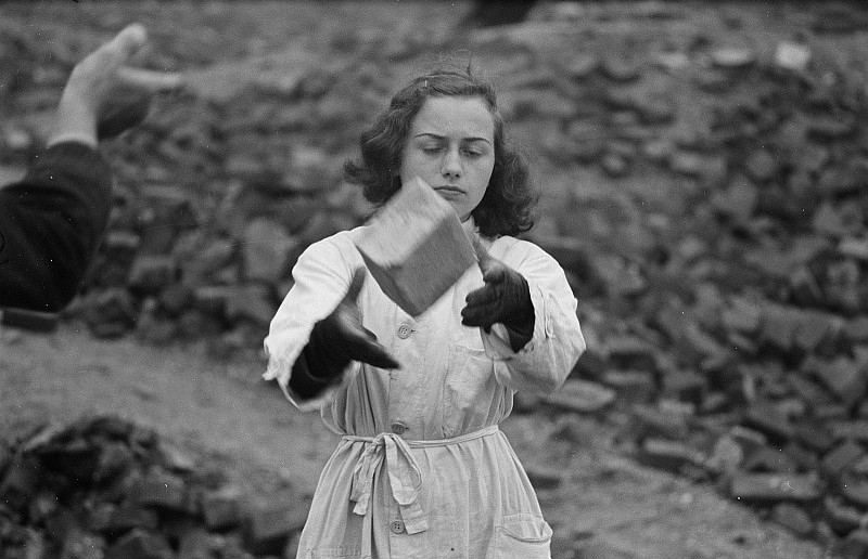 Original image description from the Deutsche Fotothek Portrait einer Frau bei der Arbeit